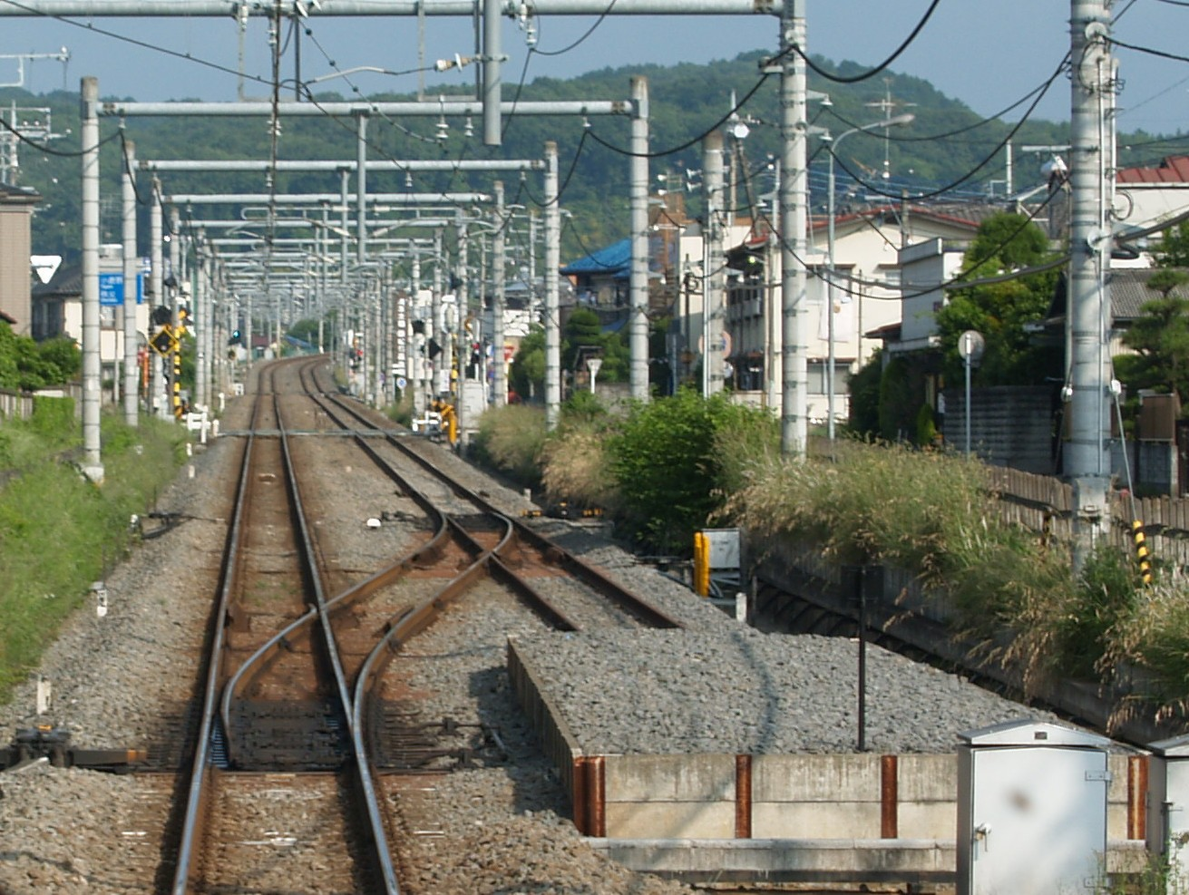 北飯能信号所（東飯能方から撮影）